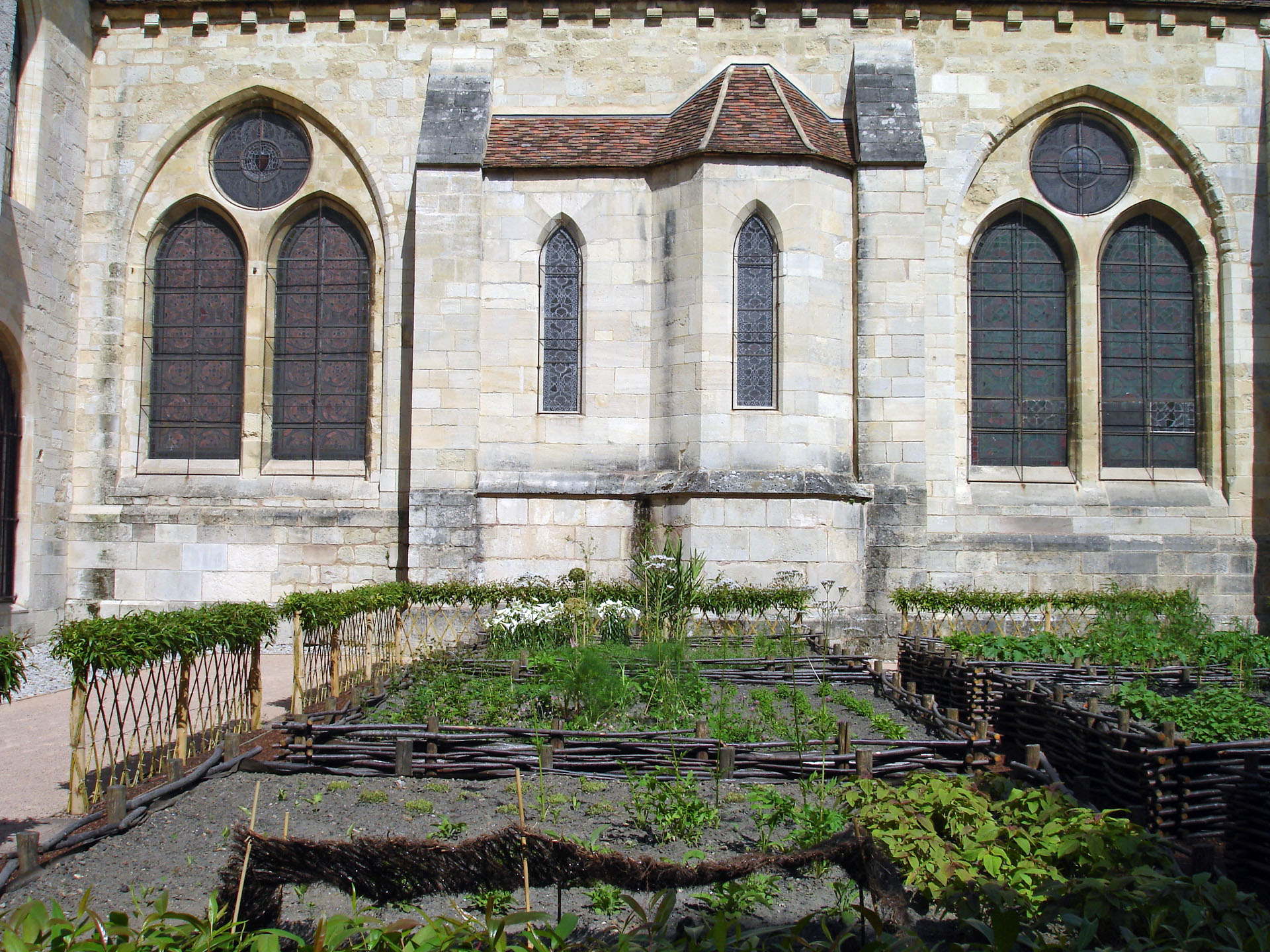 Façade ouest du réfectoire des moines de l'abbaye de Royaumont, Val-d'Oise, France.